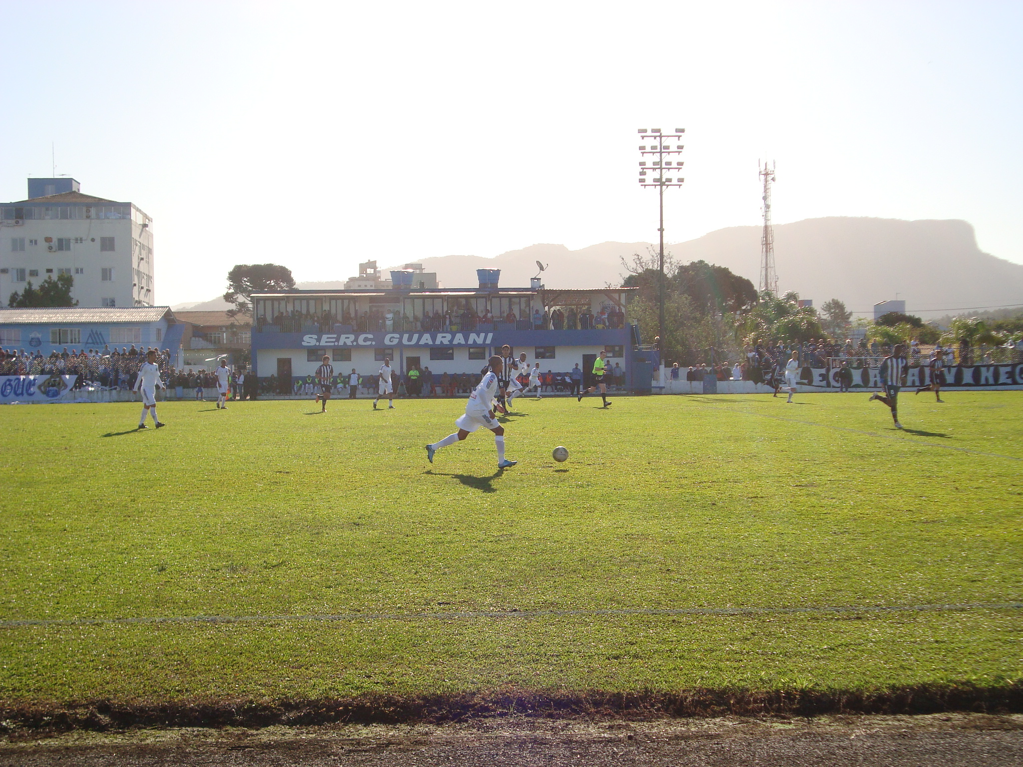 Foto do jogo de abertura do Campeonato catarinense de Futebol da Divisão Especial de 2011, entre Guarani de Palhoça e Caxias de Joinville.